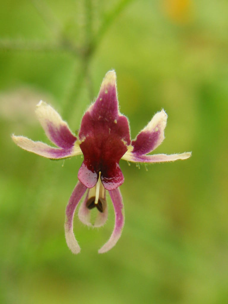 Es la especies de flores mas pequeñas del género, habita desde Illapel hasta Los Molles. Este notable género de la familis Solanácea, es el único de flores zigomorfas, ancestro evolutivo de la familia.